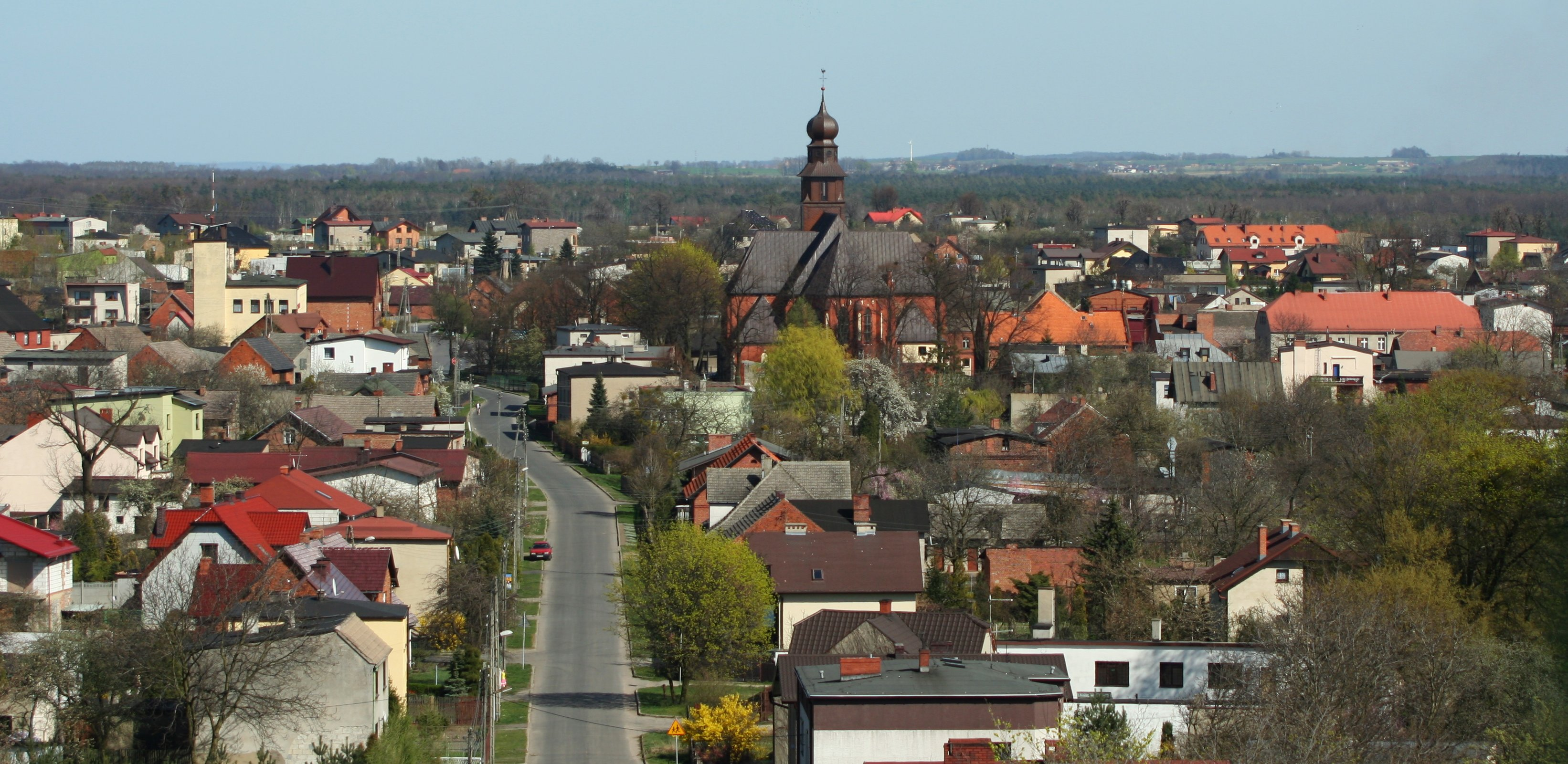 Koszęcin - fragment miejscowości, powiat lubliniecki, województwo śląskie. Zdjęcie wykonane zostało z wieży widokowej